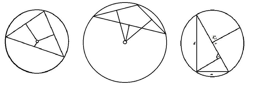 Opisan krug oko ostrouglog, tupouglog i pravouglog trougla